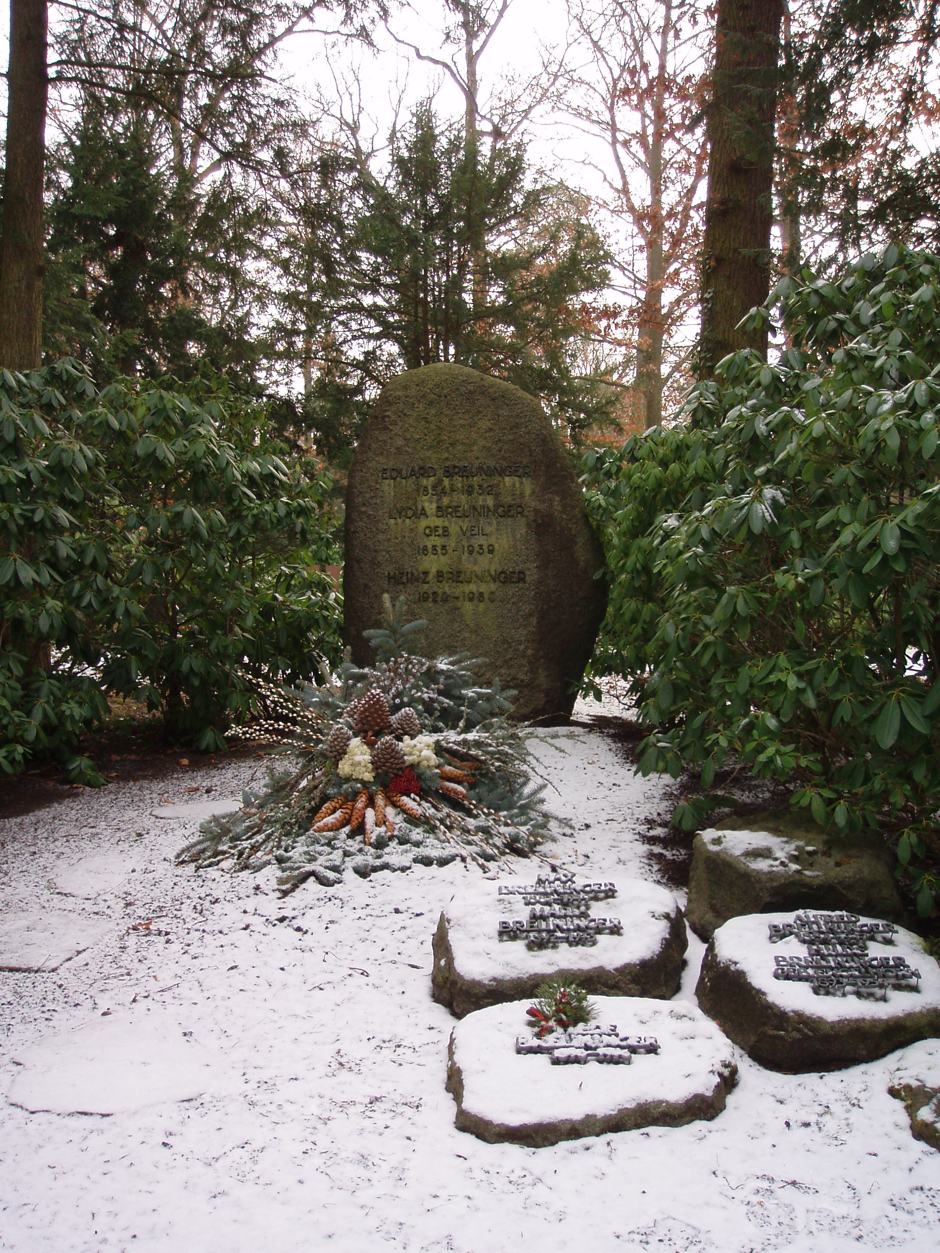 Grab von Eduard Breuninger auf dem Stuttgarter Waldfriedhof